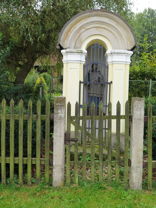 Výklenková kaplička, jižní část vsi, Svobodín.